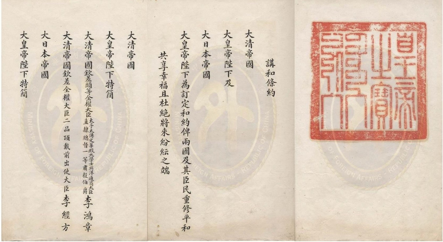 中日講和條約（馬關條約）漢文簽署本(蓋有「皇帝之寶」印)